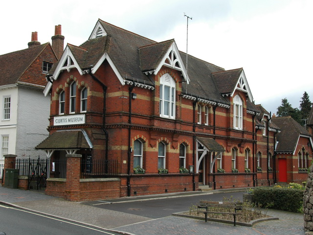 Curtis Museum, Alton